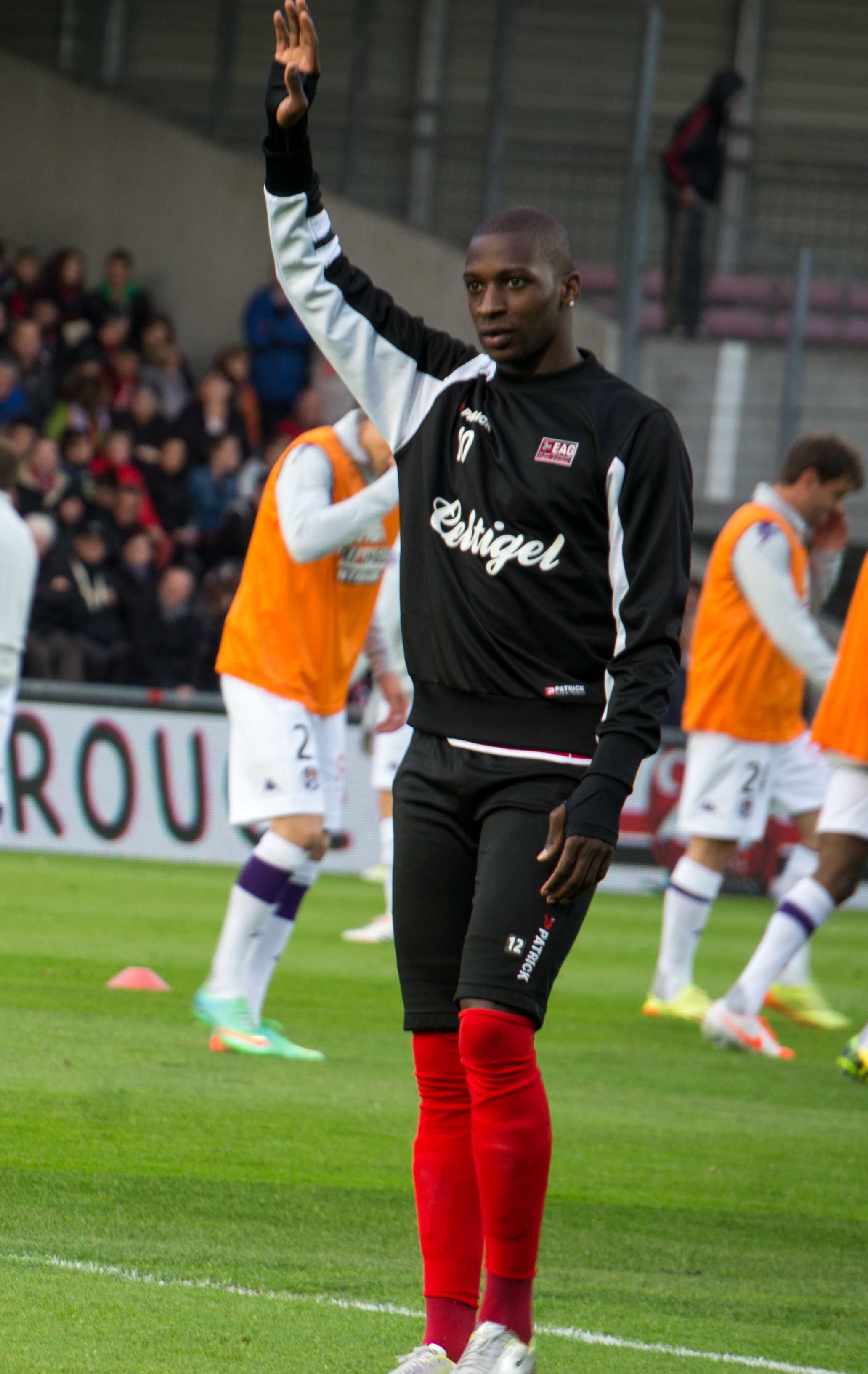 Guingamp-Toulouse le 10 mai 2014